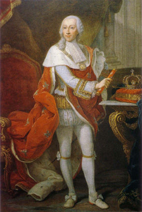 Ritratto di Vittorio Amedeo III di Savoia (1726-1796) in abiti da incoronazione